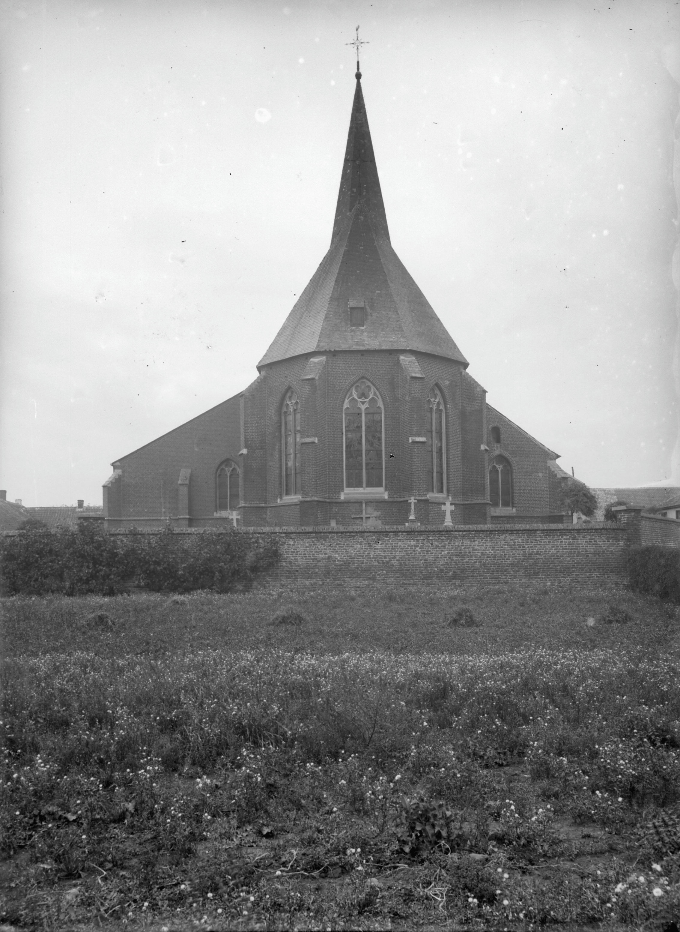 Onze-Lieve-Vrouw-Tenhemelopnemingskerk: Overzicht kerk vanuit het oosten gezien